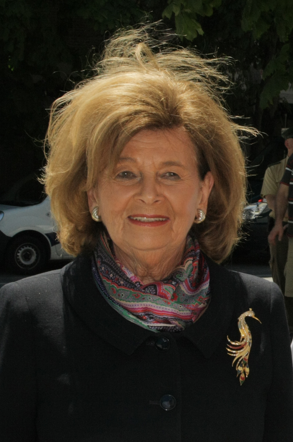 Charlotte Knobloch, u. a. Präsidentin der Israelitischen Kultusgemeinde München und Oberbayern. Hier am 30.05.2011 in München. Titel des Werks: "Charlotte Knobloch (2011)"